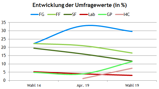 Europawahl 2019 Irland Umfragen